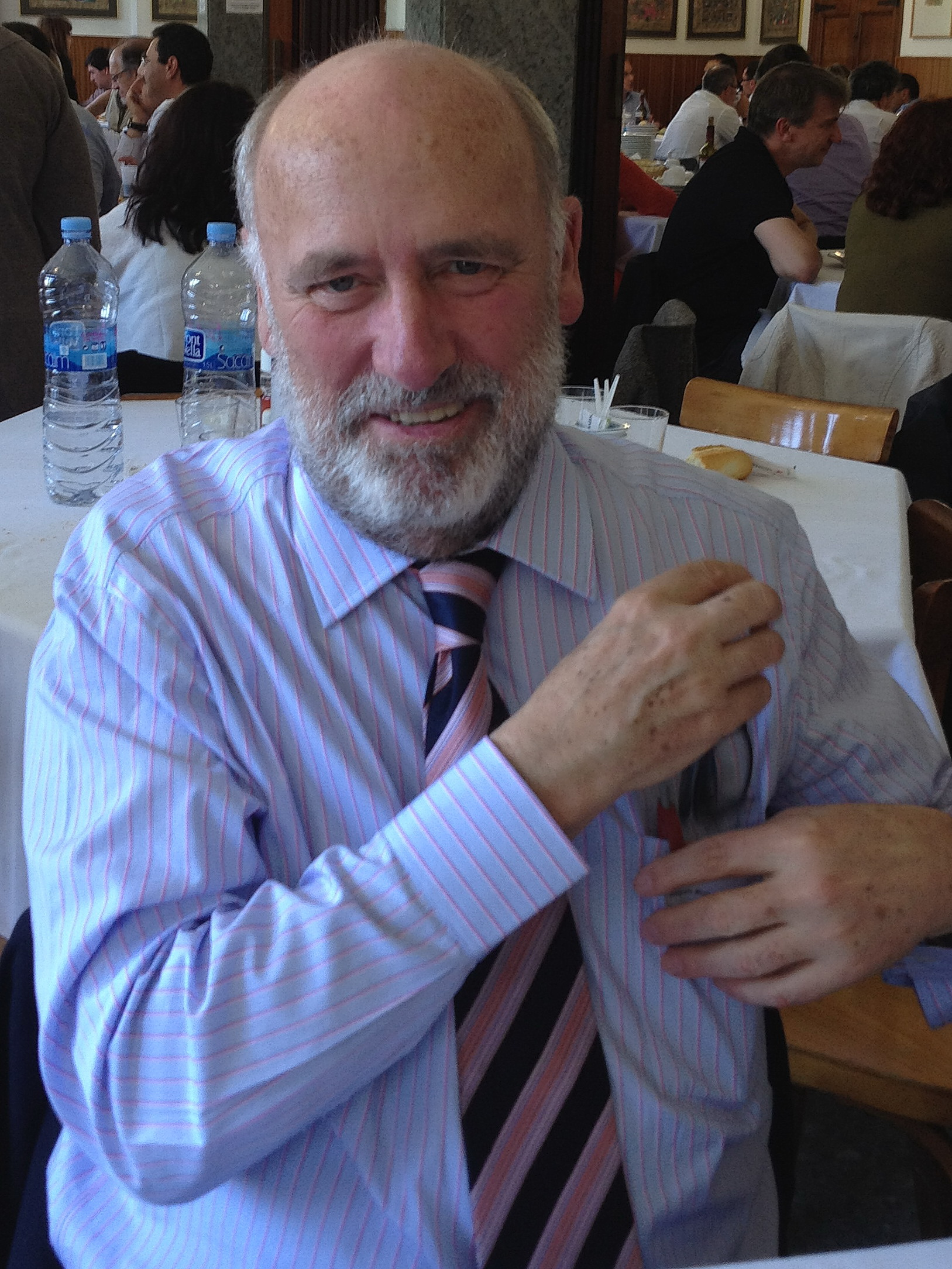 Joaquim Molins (Barcelona, 9 de febrer de 1945 - 13 de juliol de 2017) fou un polític i empresari català. Imatge de 2014